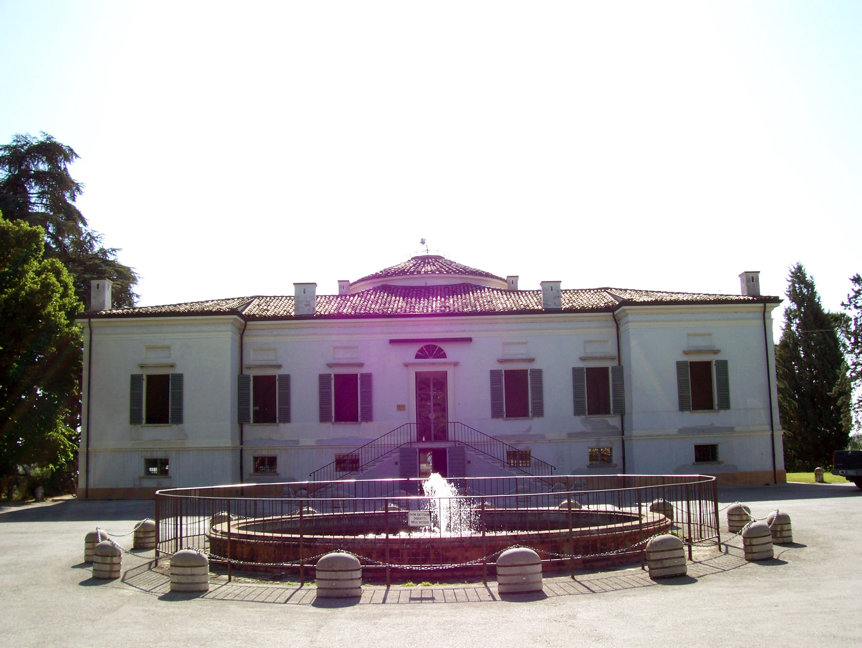 Prospetto d'ingresso